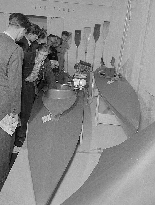 Original image description from the Deutsche Fotothek Besucher am Stand des VEB Kunststoff- und Textilverarbeitungswerk Pouch betrachten Faltboote, Herbstmesse 1953